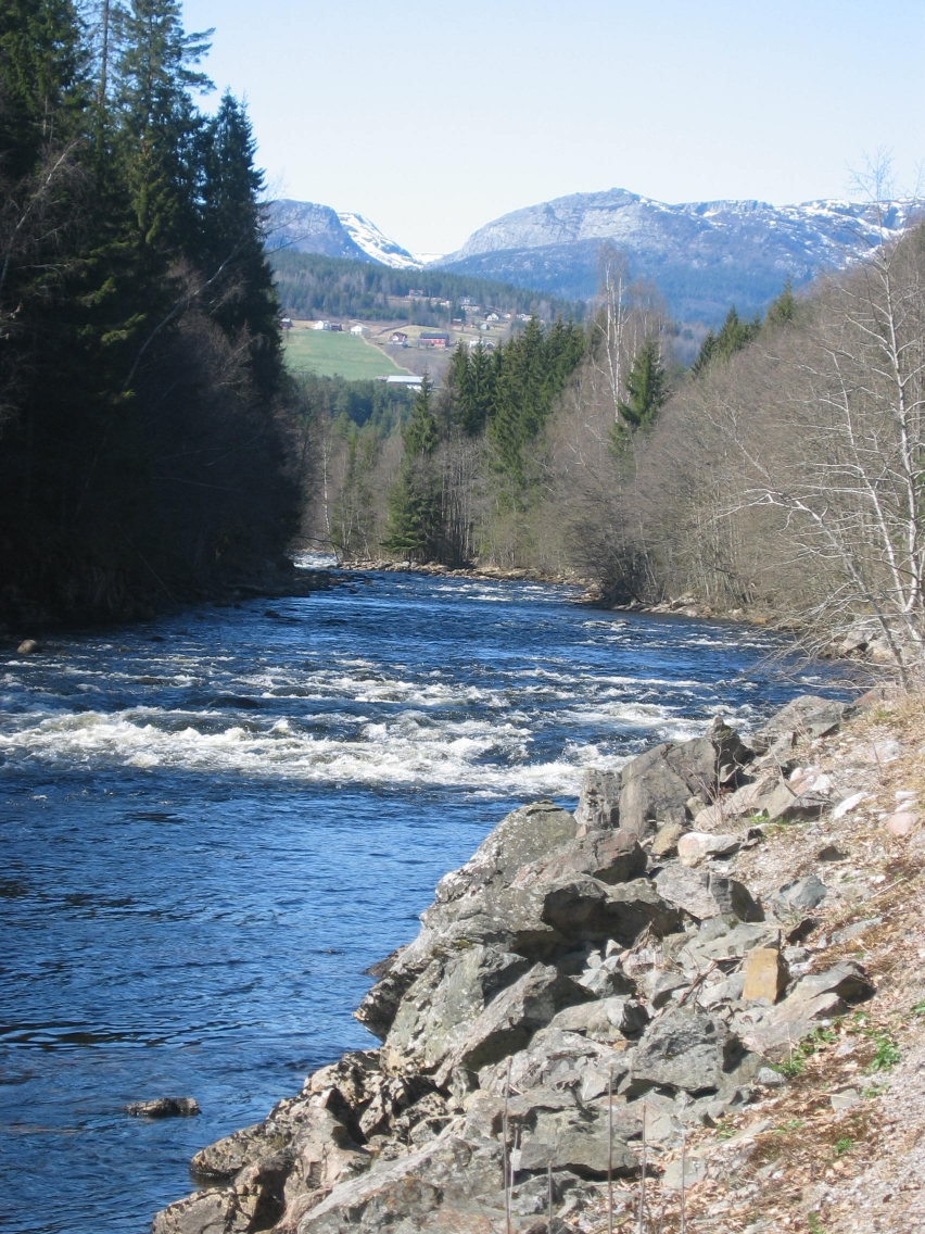 Fra Bøelva mot Liheia